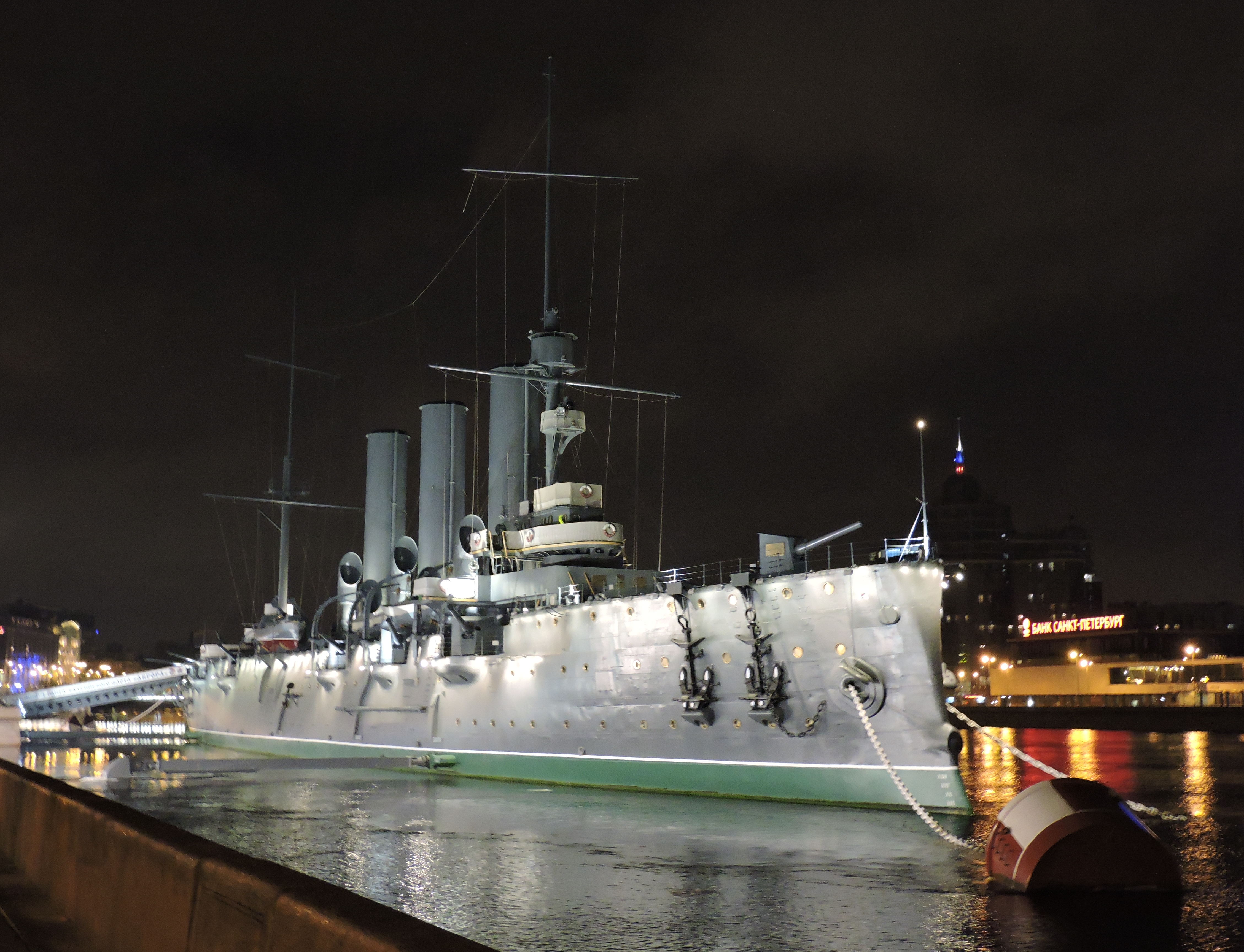 Ночной вид крейсера "Аврора"